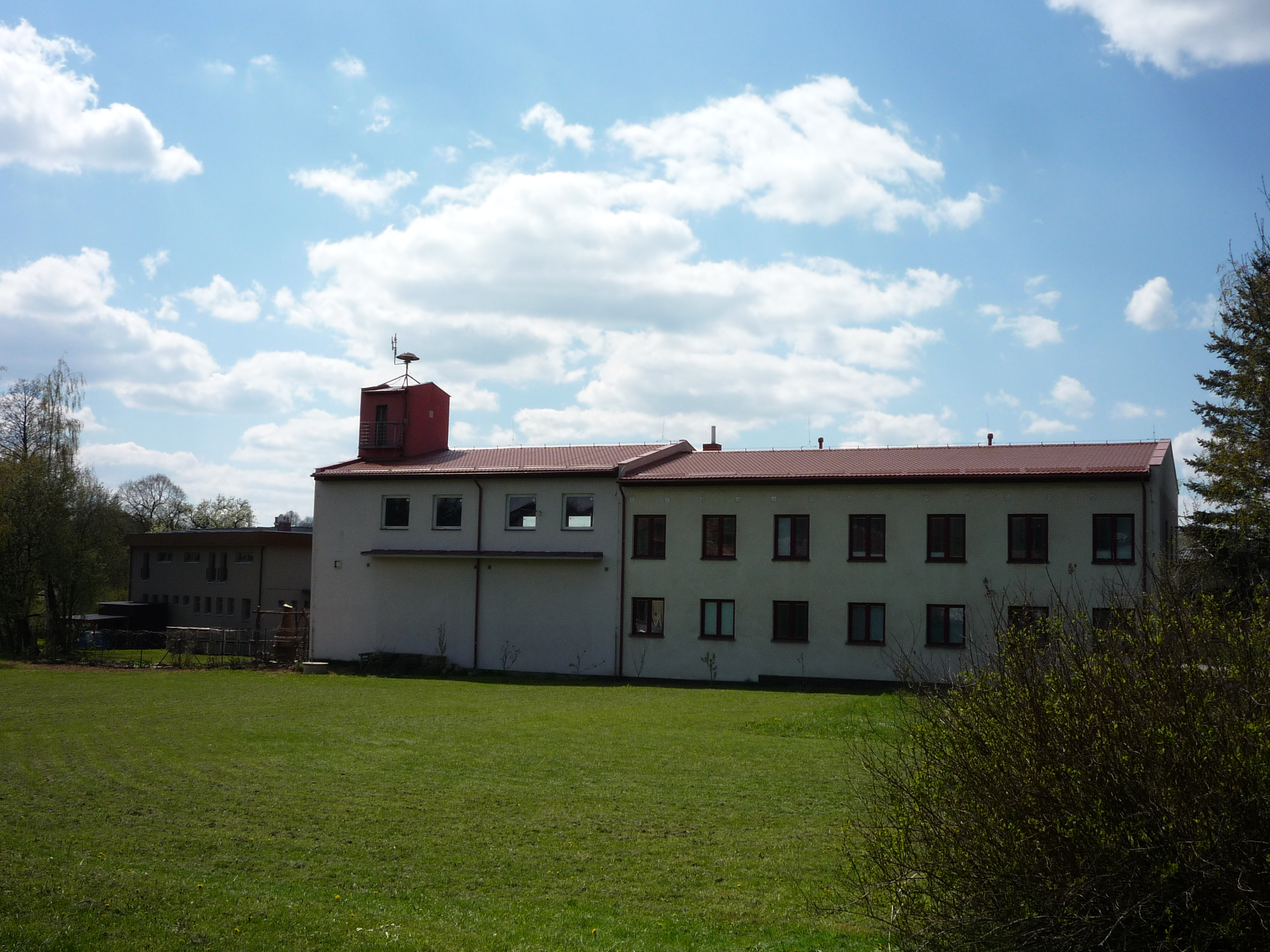 Autor fotografie Jiří Zelenka. Toulky vysočinou. Perknov. Městská část Havlíčkova Brodu.